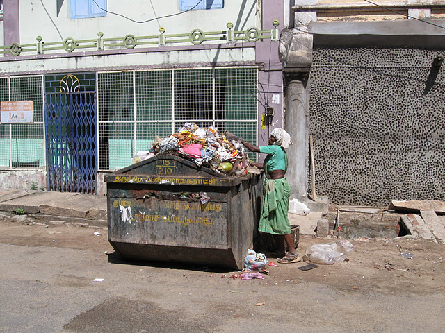 குப்பைகளைக் கூட்டிச் சேகரித்துத் தொட்டியில் நிரப்பும் பெண்.